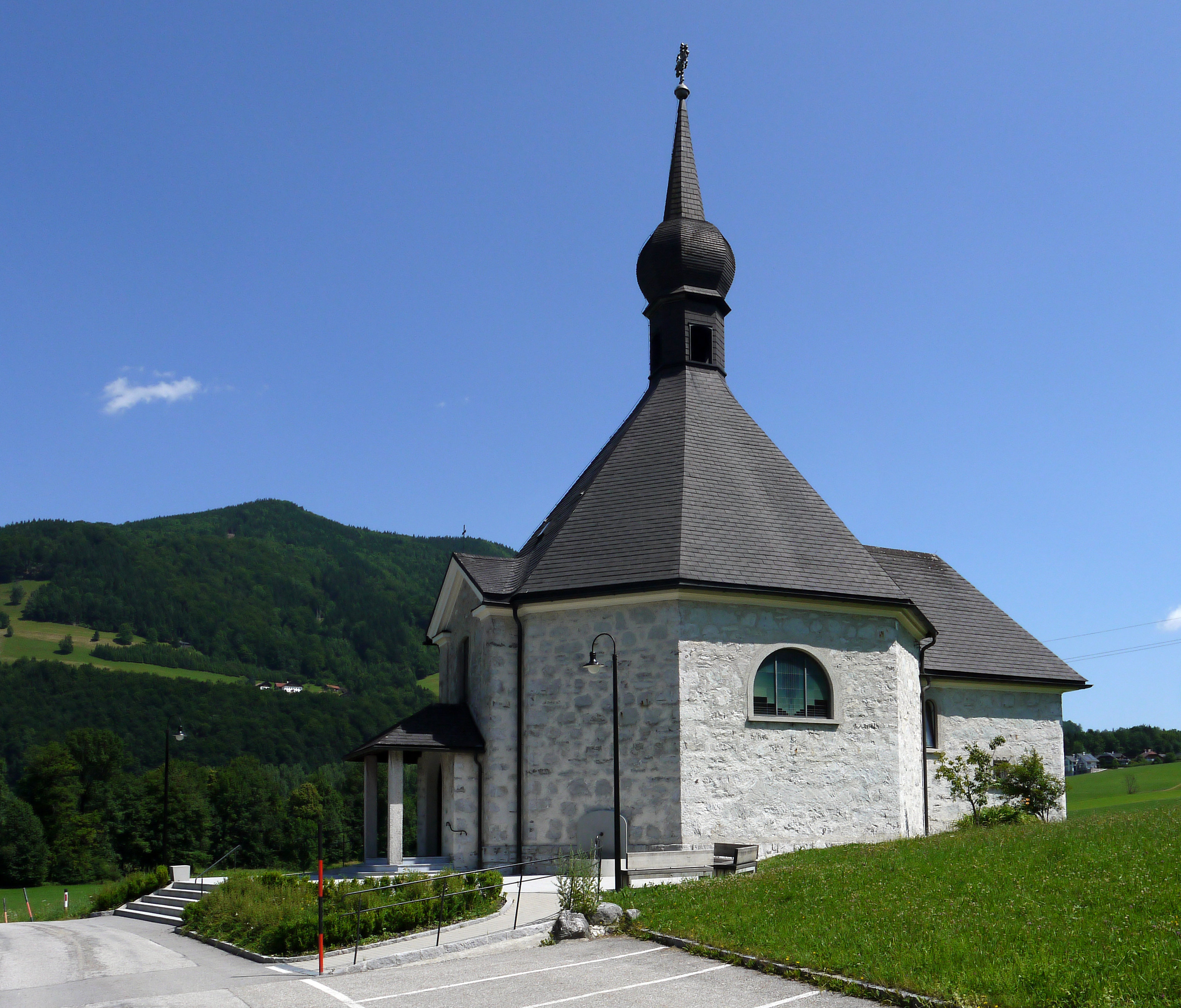 Kath. Filialkirche hl. Josef, Heimkehrerkirche Loibichl